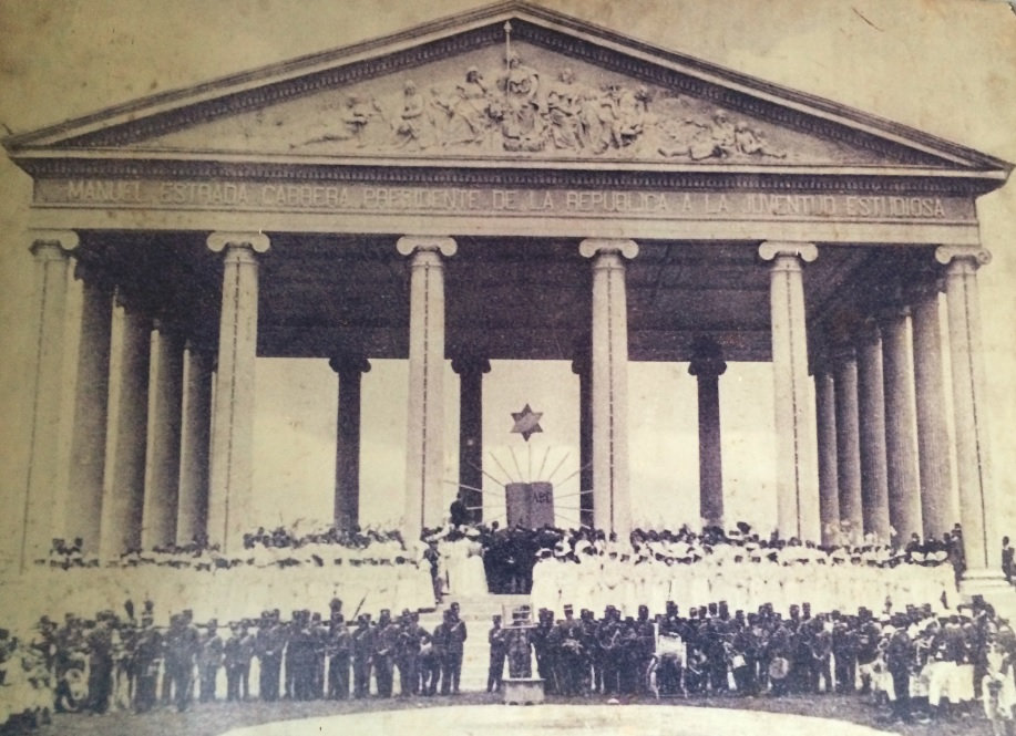 Templo de Minerva de la ciudad de Guatemala en 1,905.